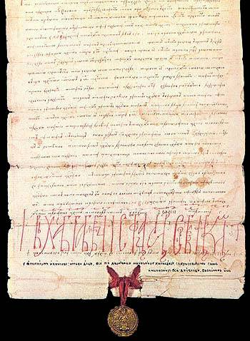 Povelja Cara Dušana Hilandaru